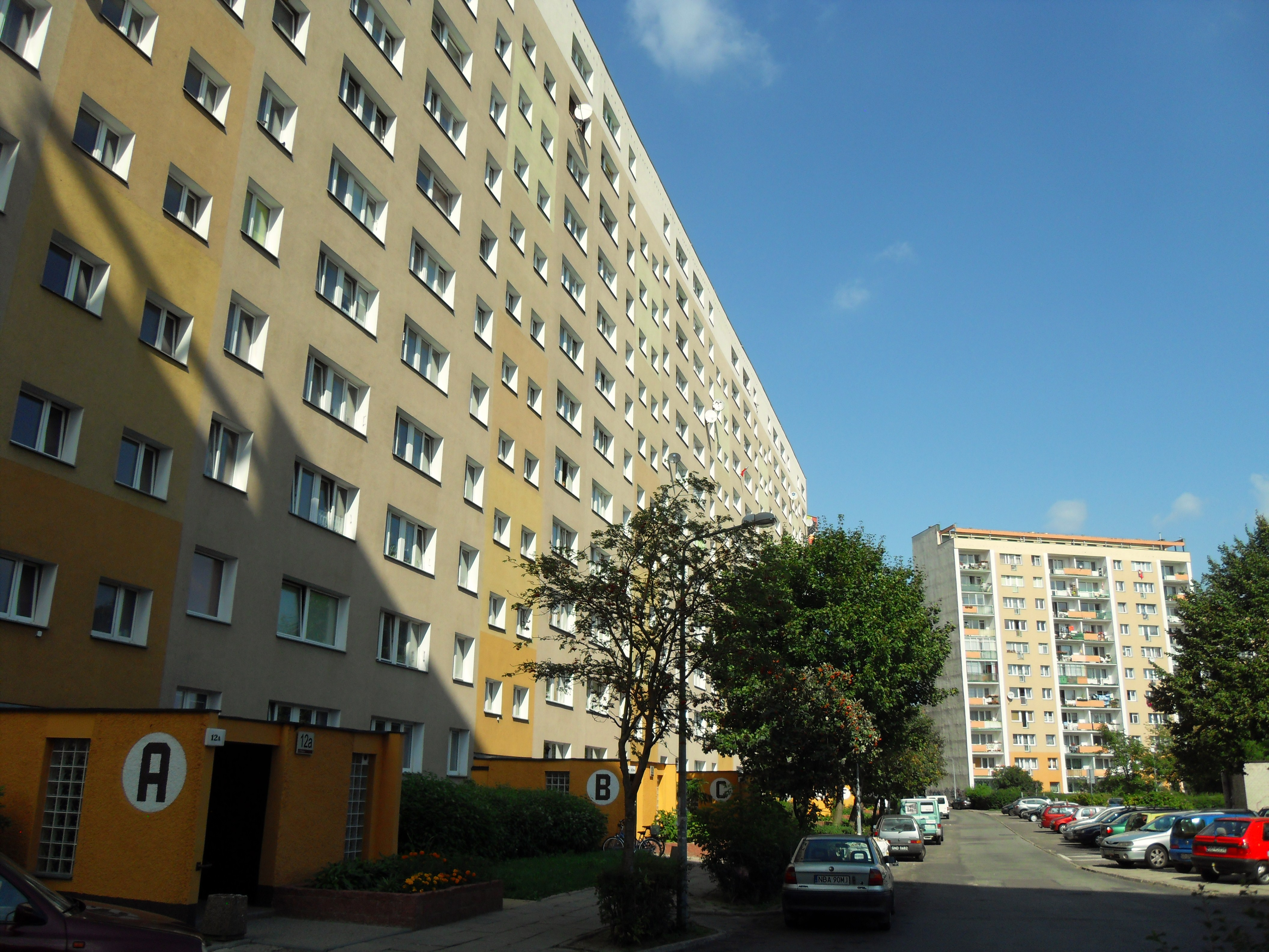 Gdańsk Zaspa Młyniec, ul. Pilotów 12 (po lewej) i 13 (w głębi).